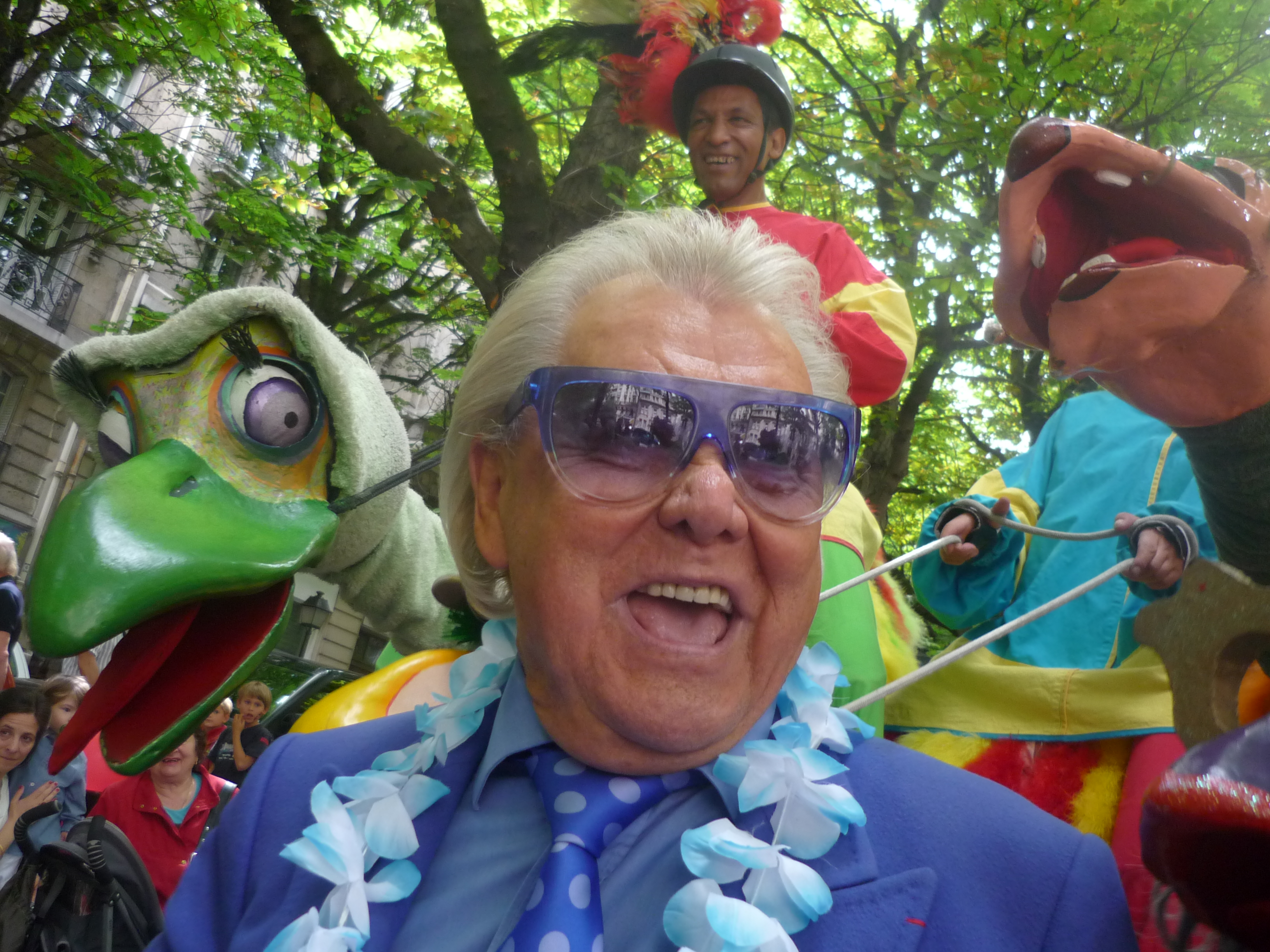 Michou devant la troupe d'échassiers-autruches de la compagnie du Toucan à la Promenade de la Vache enragée le 25 juin 2011 à Montmartre.